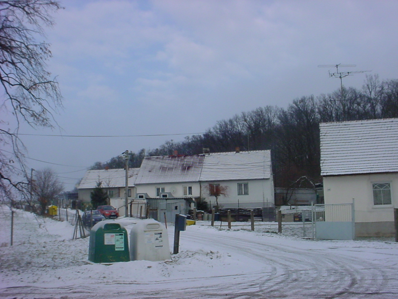 Kývalka-boční ulice